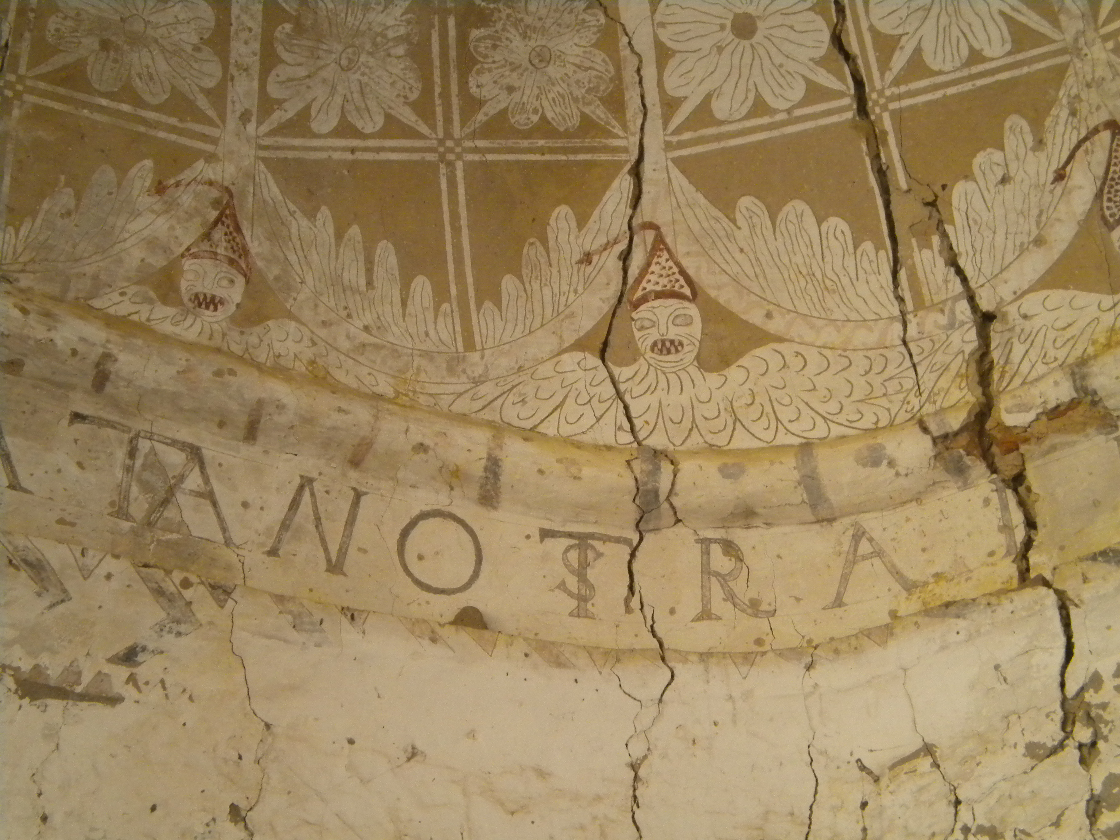 Representaciones en esgrafiado en la bóveda de la ermita del Santo Cristo de Talaván (Extremadura, España)